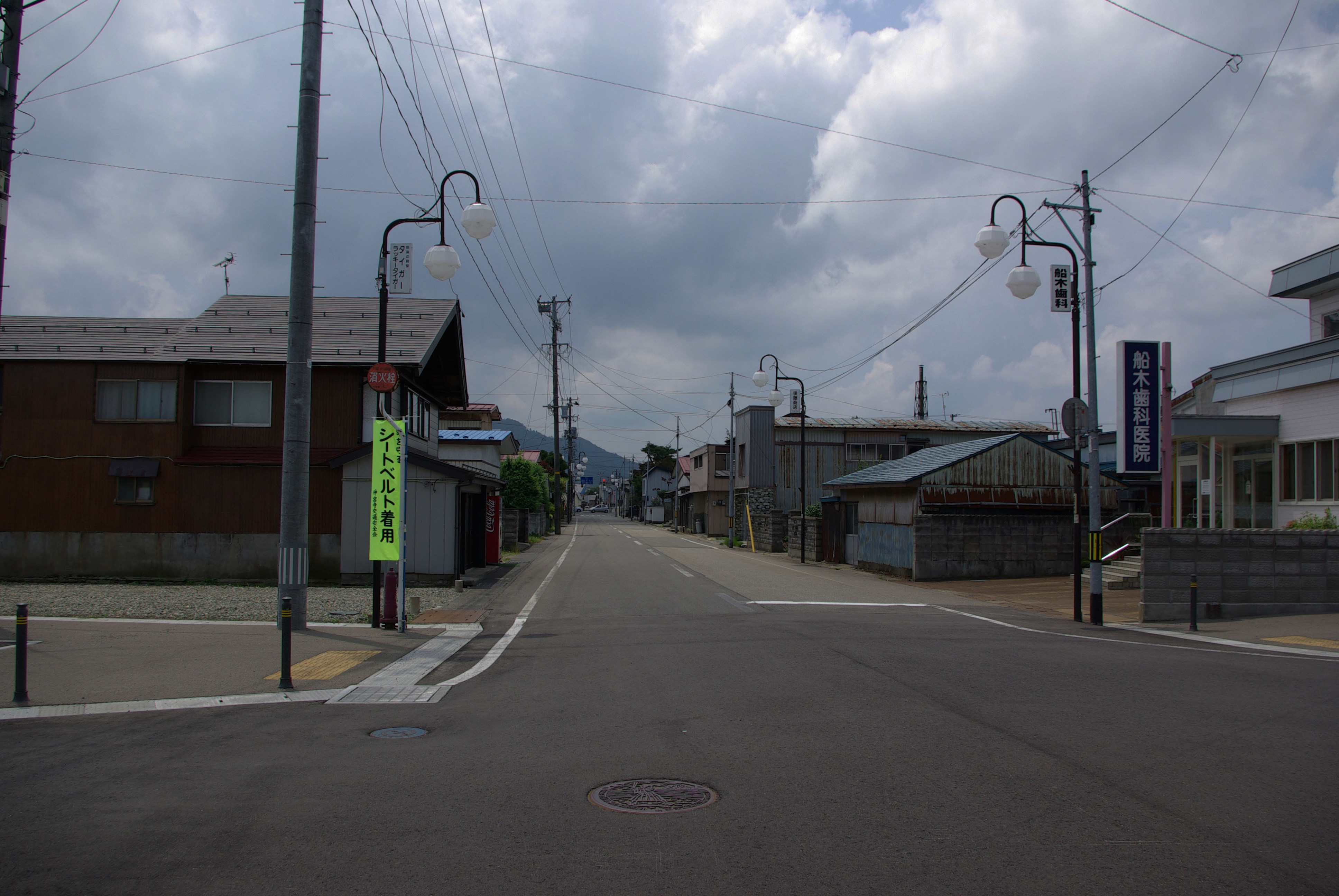 奥羽本線神宮寺駅